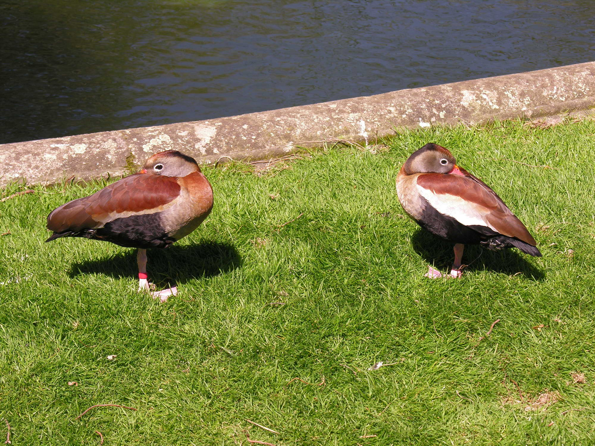 self made. Pato (Bellied Whistling-Duck. Dendrocygna autumnalis) na Alameda de Santiago de Compostela, Galicia, Spain.